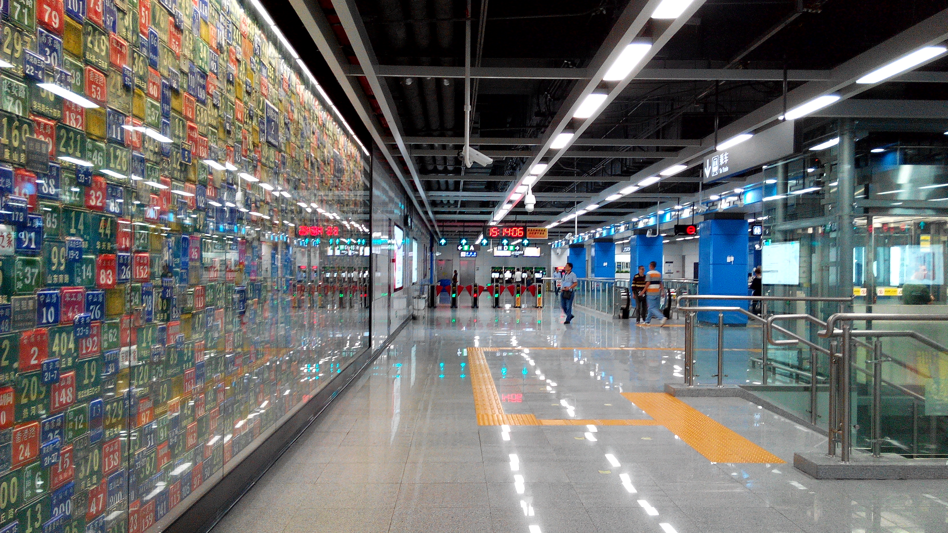 深圳地铁9号线 香梅站站厅